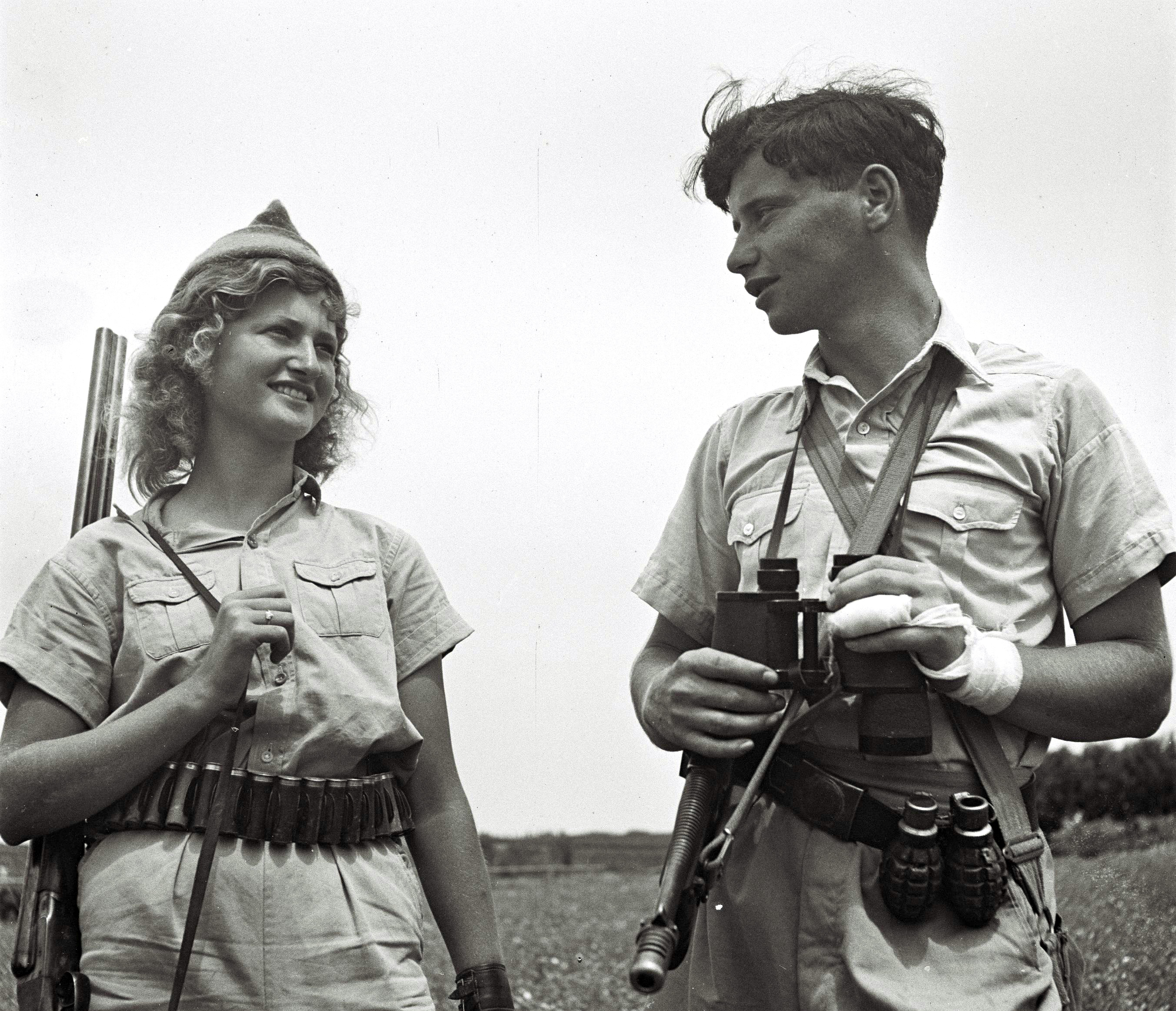 STUDENTS OF THE AYANOT AGRICULTURAL SCHOOL ON GUARD DUTY. תלמידי בית הספר החקלאי עיינות ניצבים בעמדות שמירה.